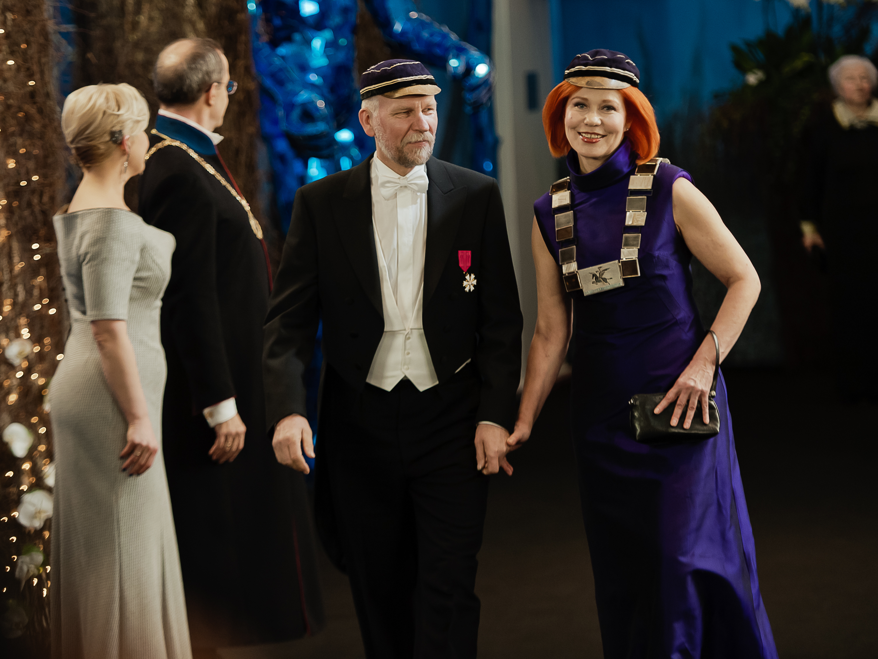 Eesti Kunstiakadeemia rektor Signe Kivi ja kunstnik Kalju Kivi presidendi vastuvõtul.